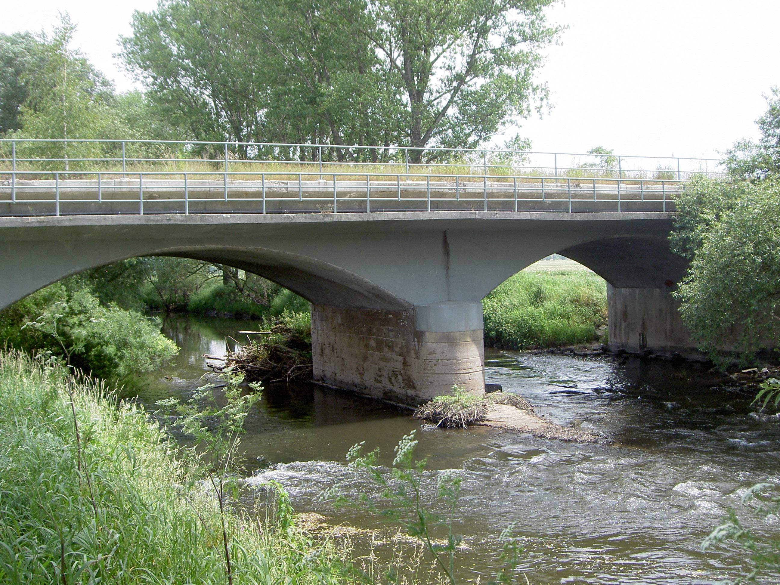 Werrabahn (Bahnstrecke Eisenach–Lichtenfels): Brücke über die Werra bei Bad Salzungen